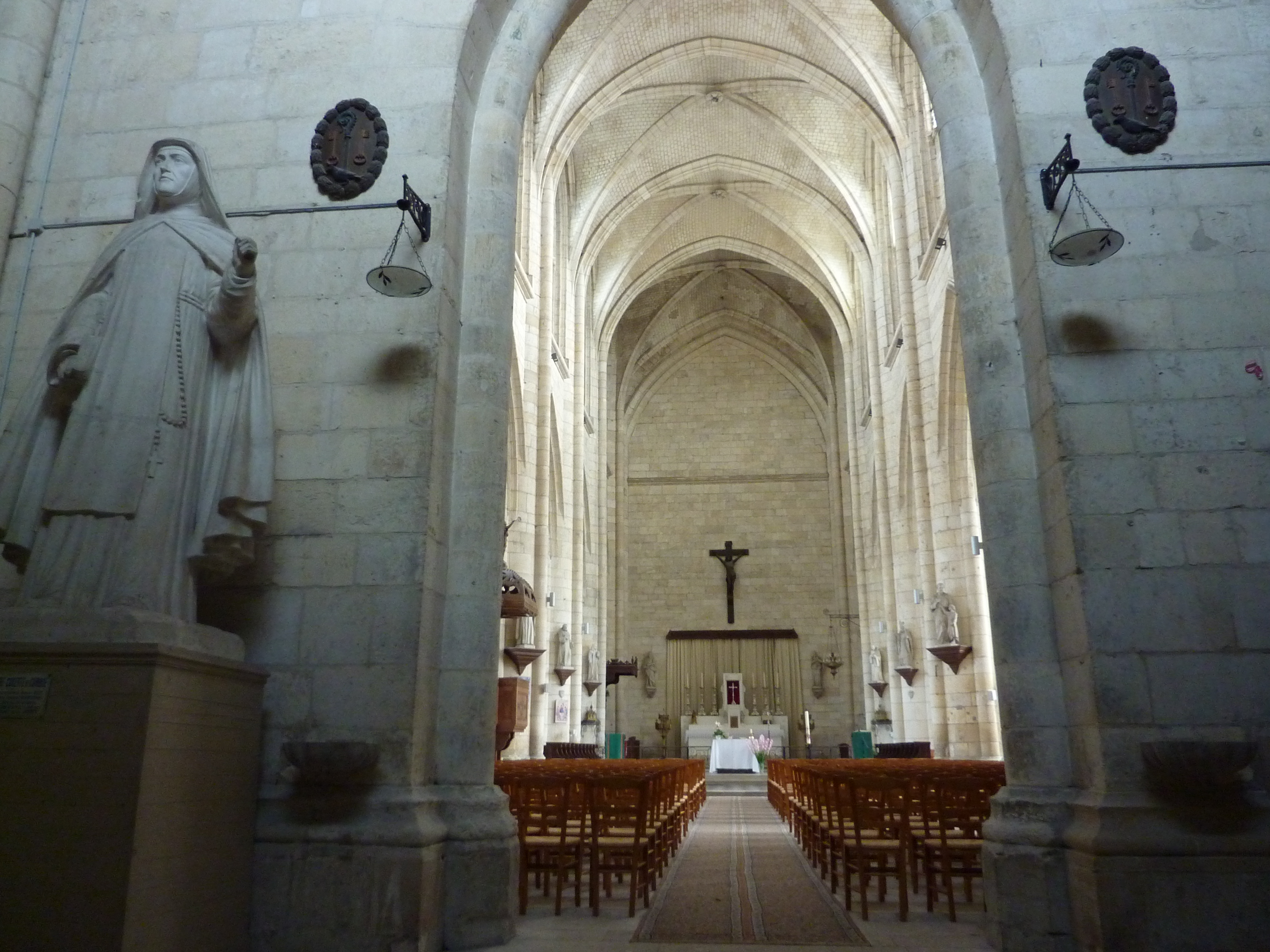 Abbatiale Saint-Pierre de Corbie, Nef